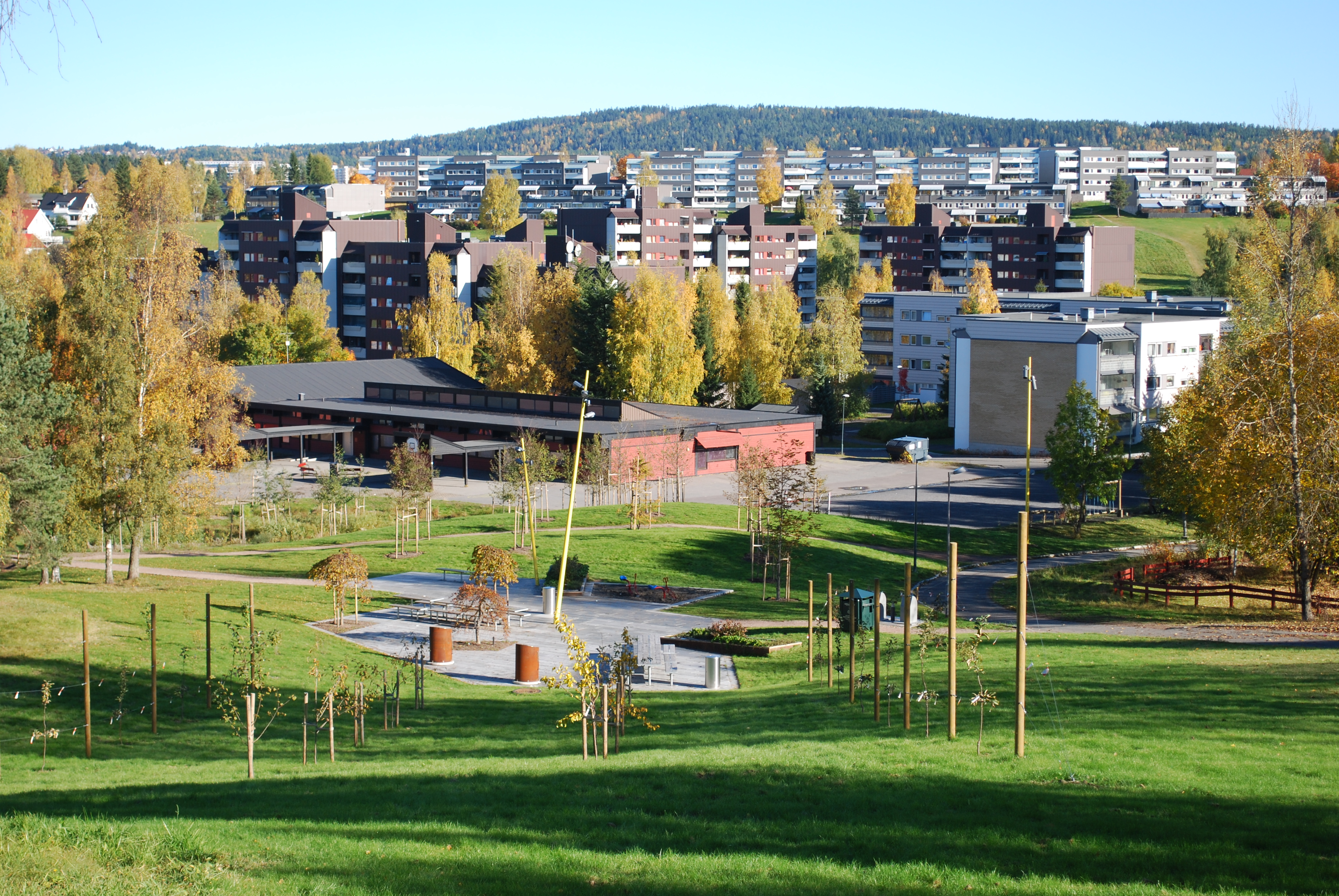 Verdensparken, Furuset, Oslo. Sitteområde sør i parken og utsyn over Gransdalen og Haugen